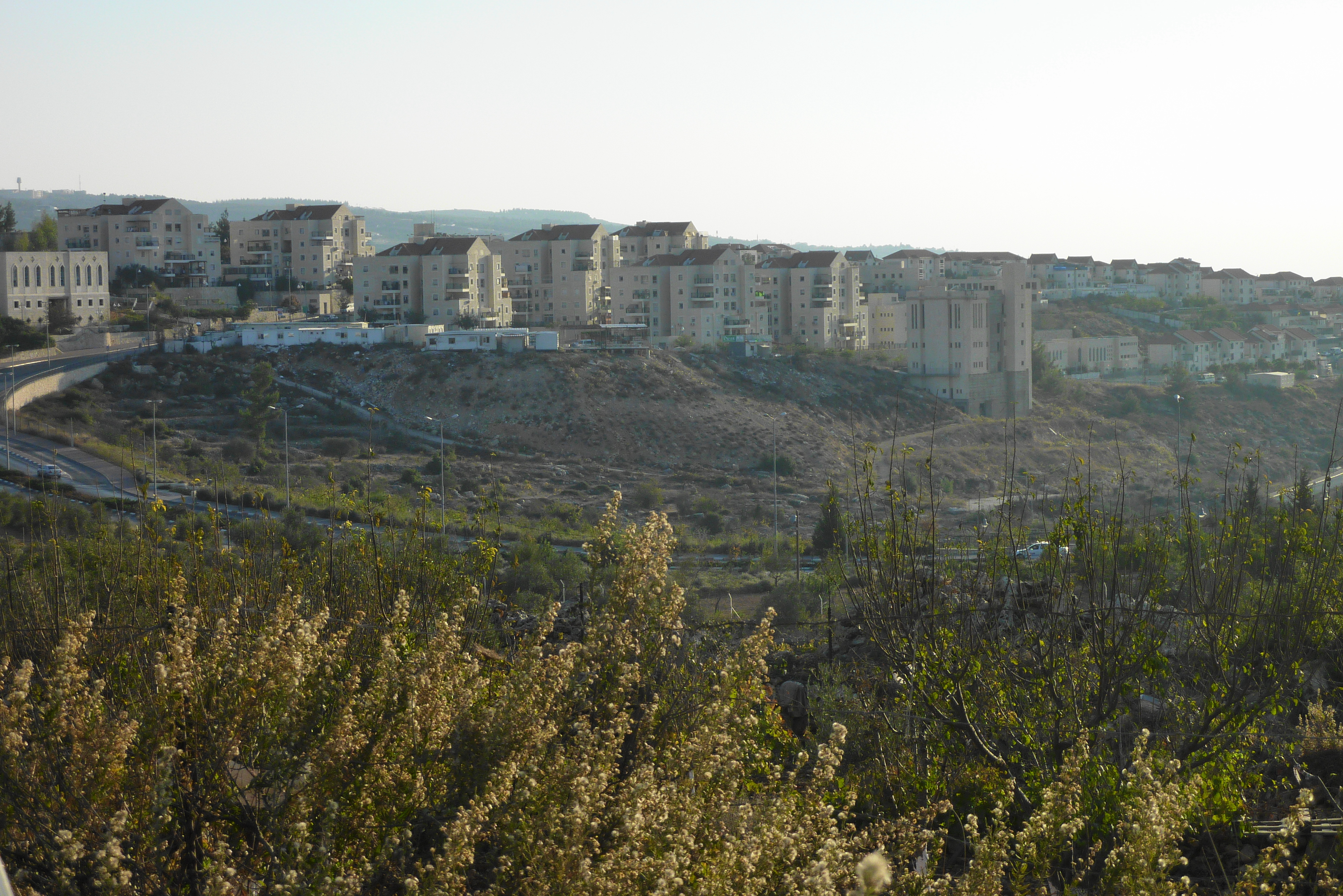 Beitar Illit settlement